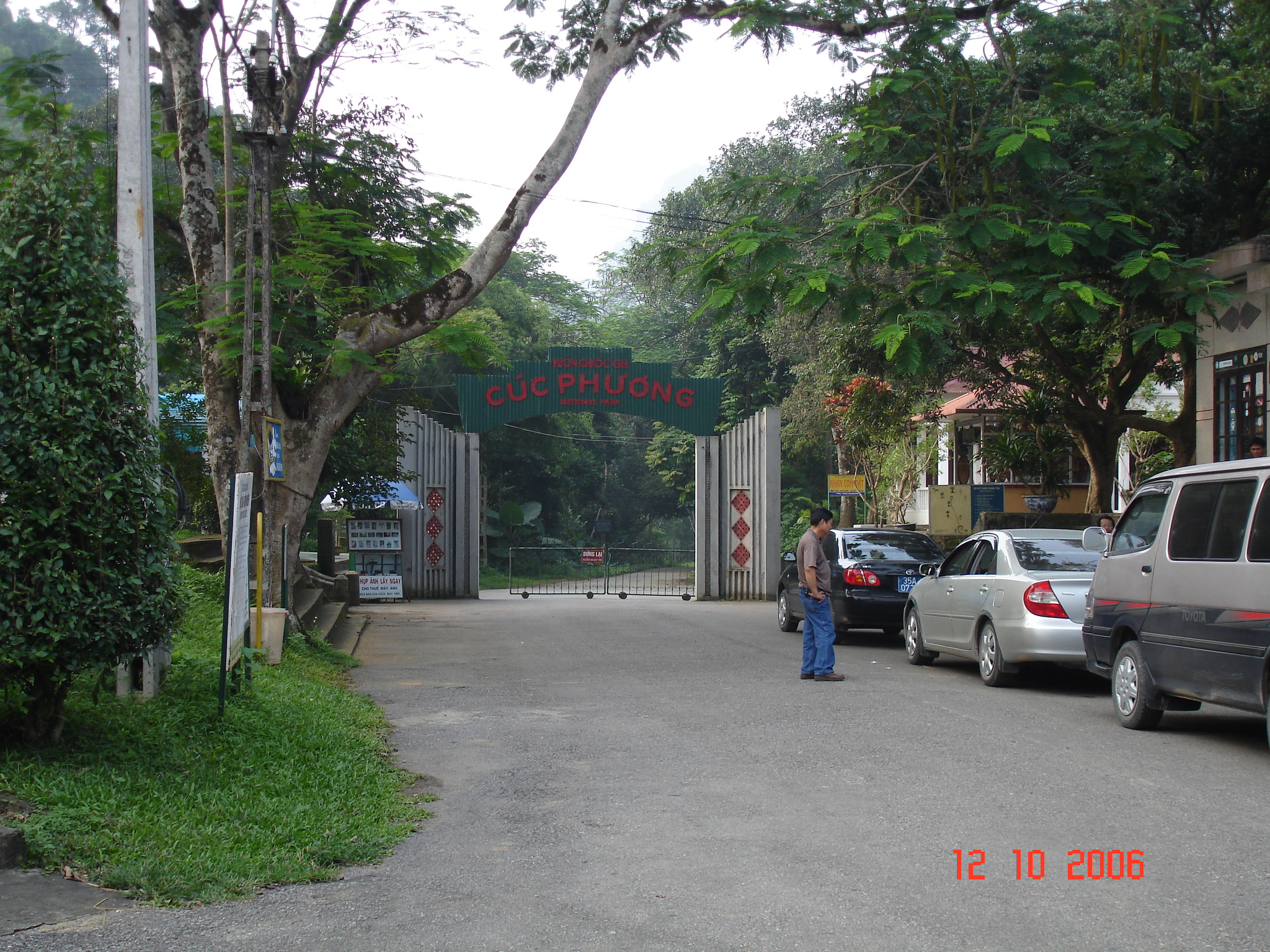 Vườn quốc gia Cúc Phương ở Hòa Bình - Ninh Bình - Thanh Hóa